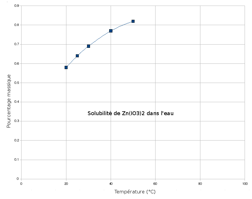 Solubilité de l'iodate de zinc dans l'eau